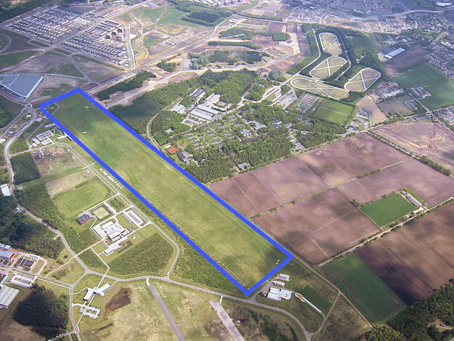 Grasstrip EAC/KLu zc